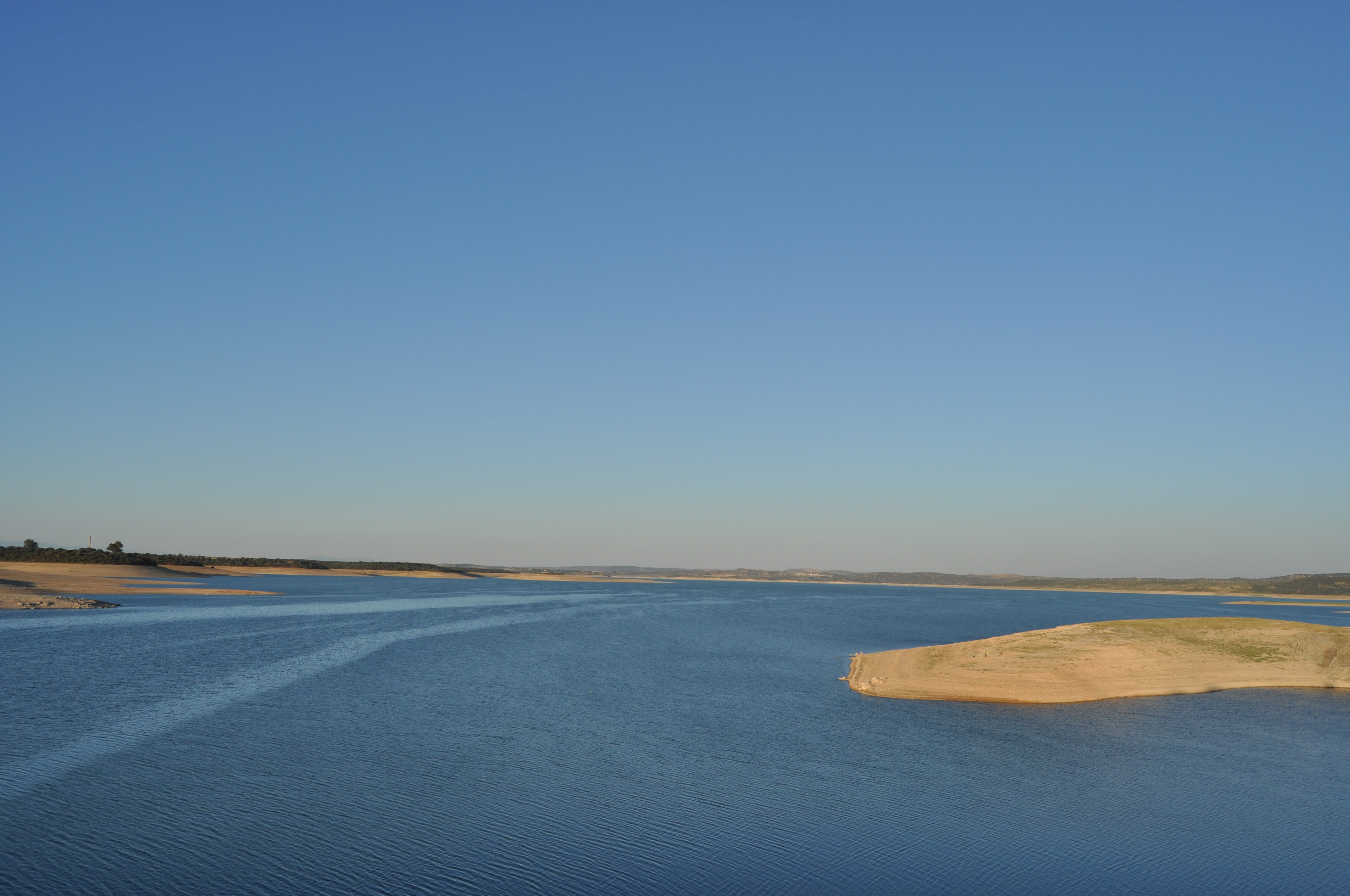 Embalse de Valdecañas